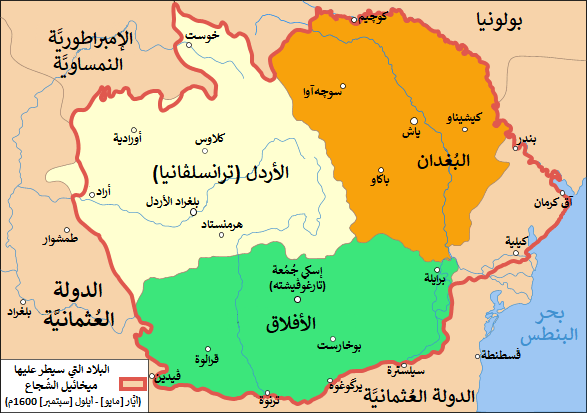 إمارات البُغدان، والأردل (ترانسلڤانيا) والأفلاق، مُنذُ 28 تشرين الأوَّل (أكتوبر) 1599 حتَّى 14 تشرين الأوَّل (أكتوبر) 1600